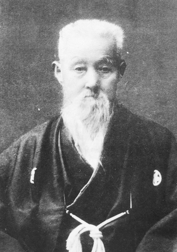 勝野秀雄（『むらからす』）